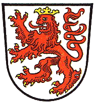 Das Bayerische Staatsministerium des Innern sieht keine Genehmigungspflicht durch die Gemeinden oder das Staatsministerium. Siehe auch: [1]